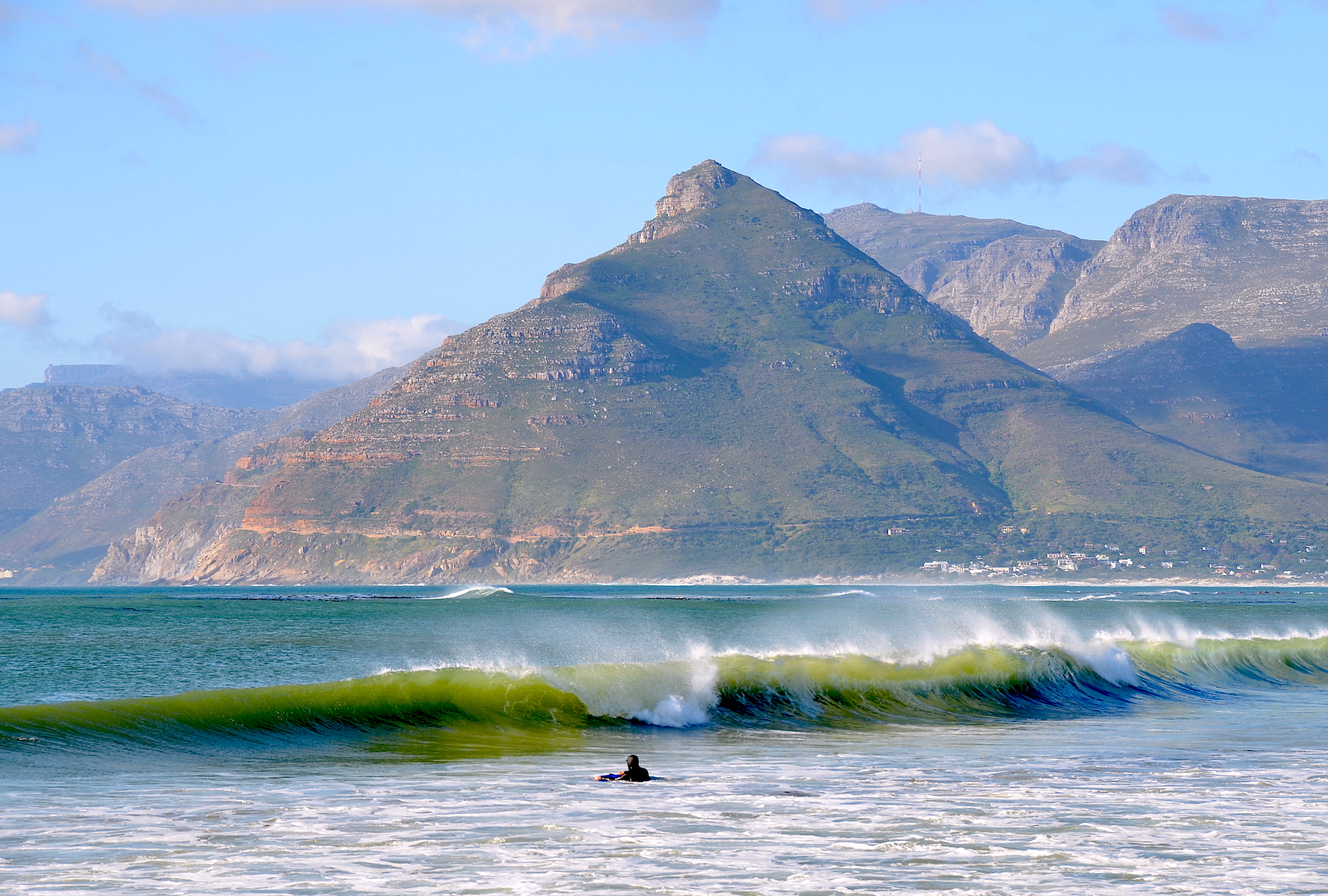 Sicht von Long Beach auf den Chapman's Peak, Südafrika